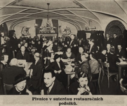 Bývalá pivnice v Rytířské 539 (rok 1938)